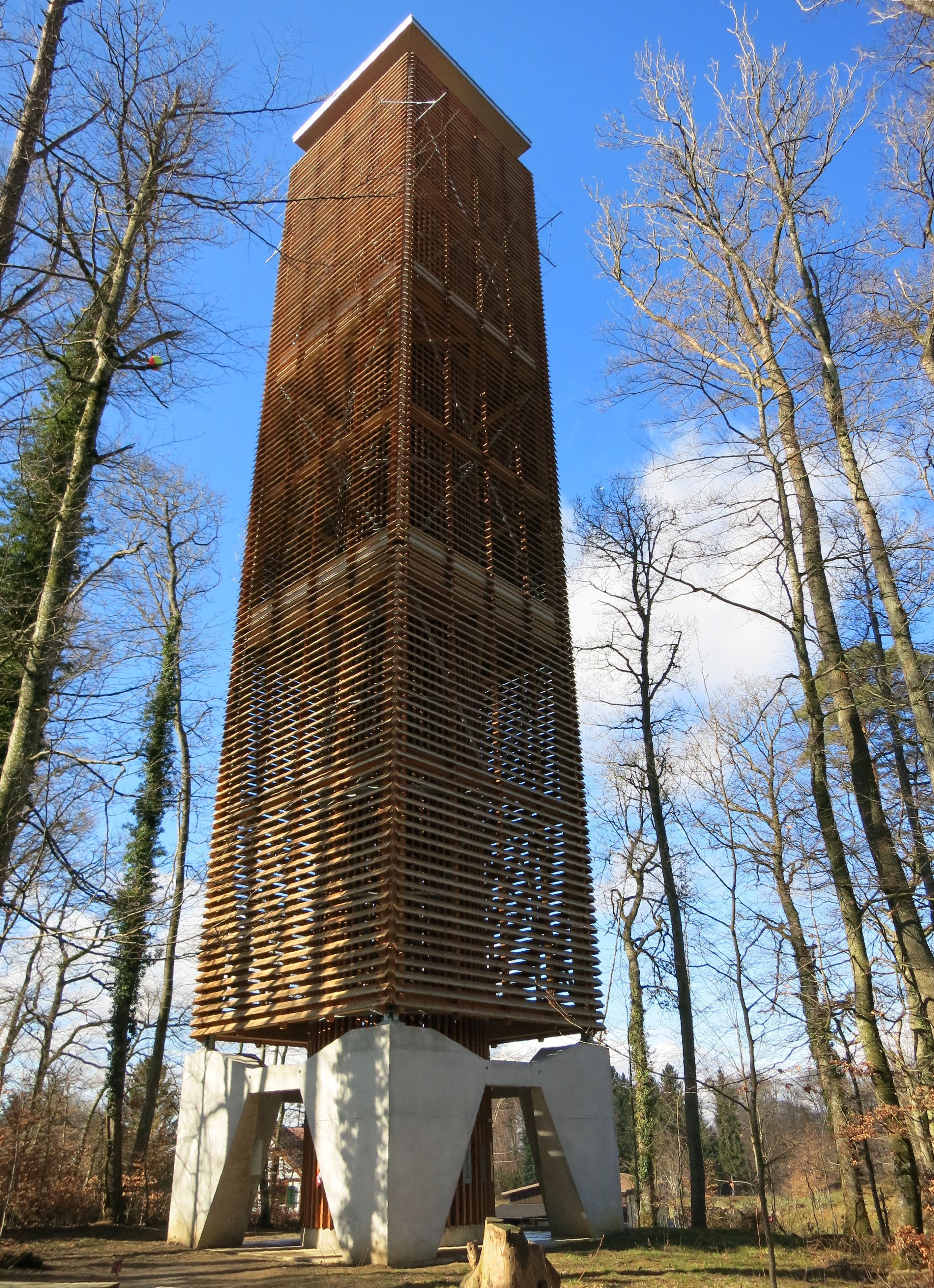 Napoleonturm Wäldi